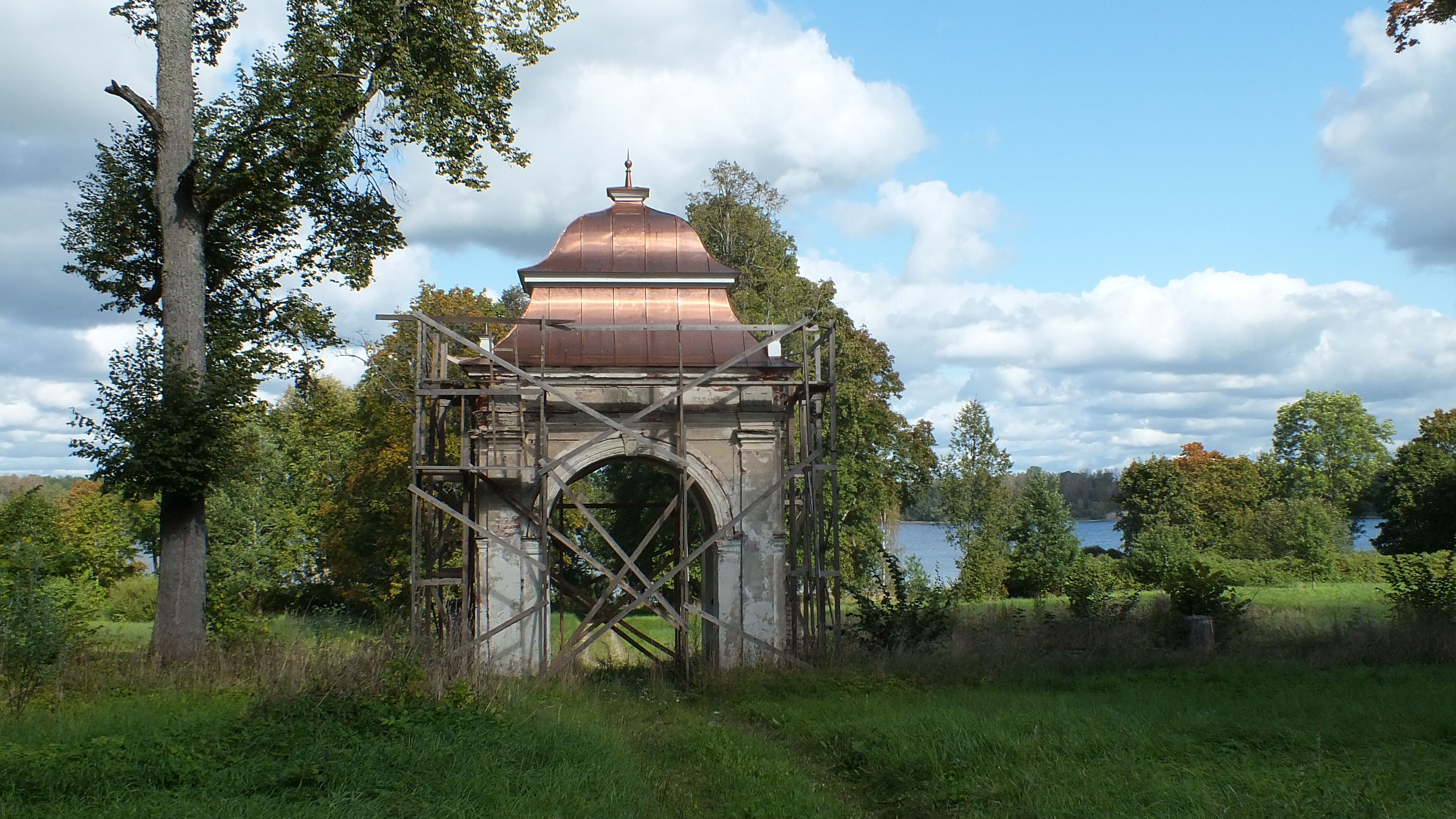 Lindes muižas vārti